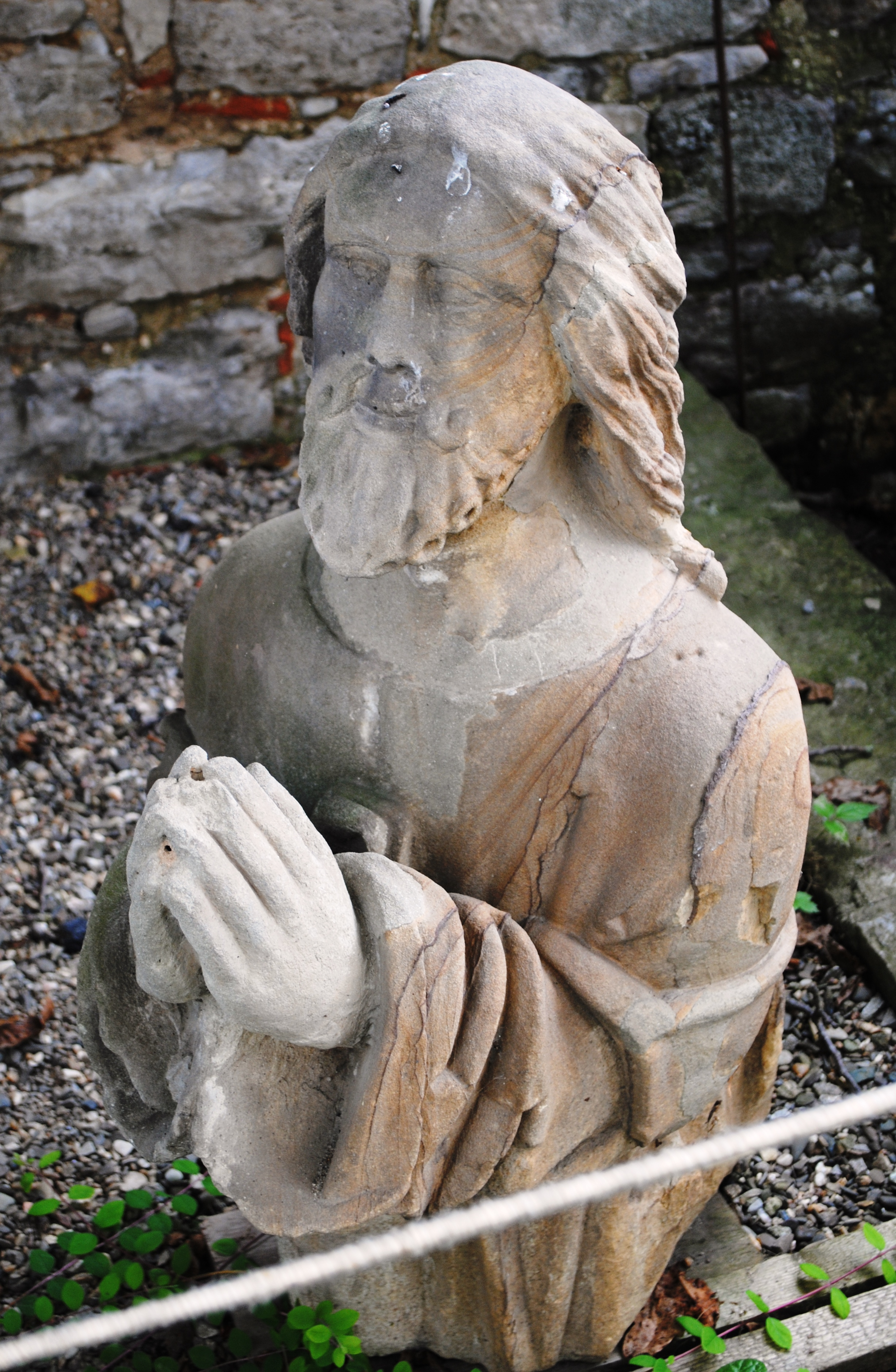 Figur, Ölberg, außen, Maria im Weingarten, Volkach